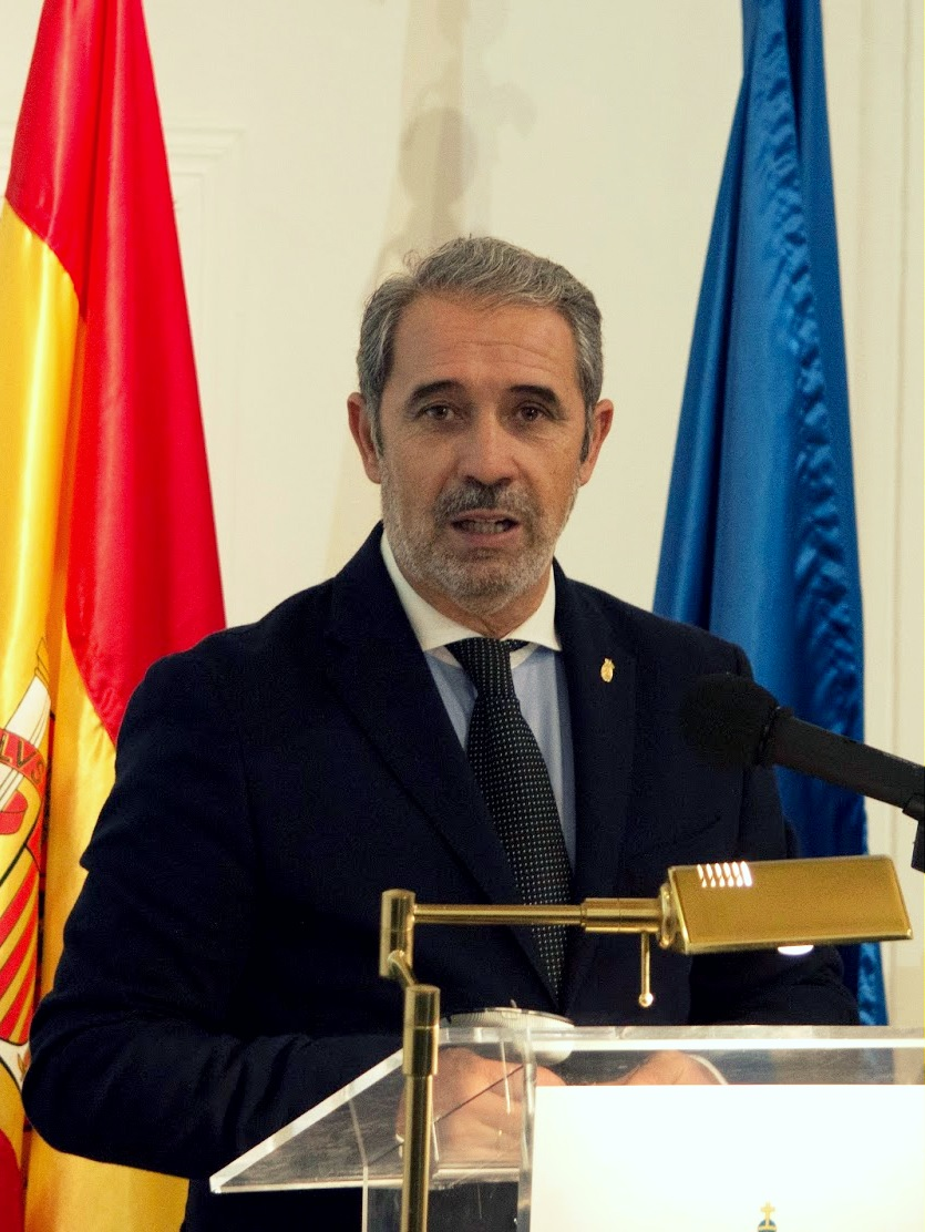 Francisco Armijo Higueras